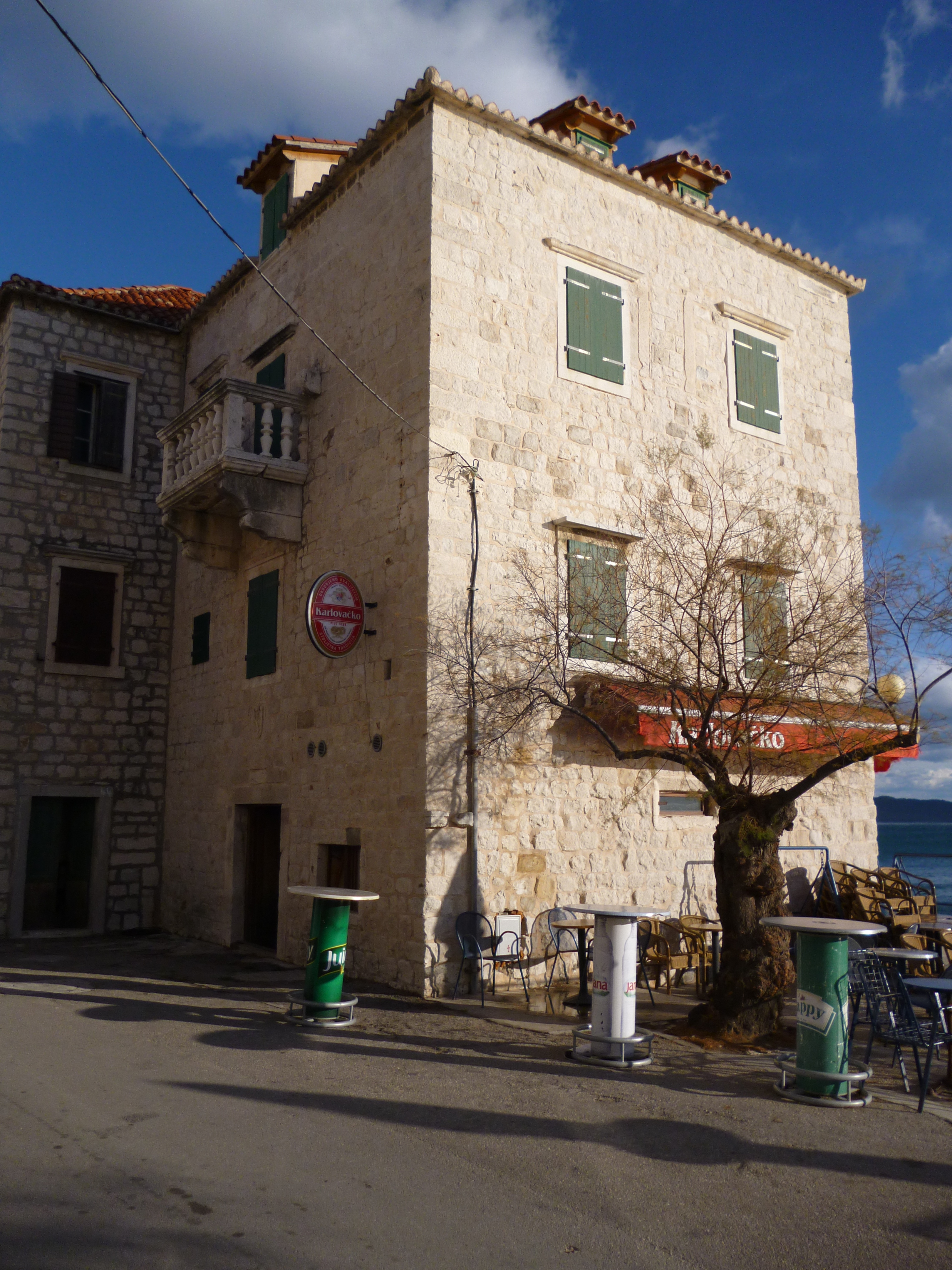 kaštel Celio Cega u Kaštel Starom